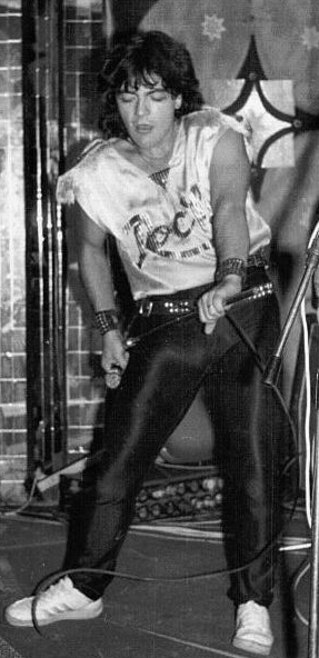 Leo Iorga